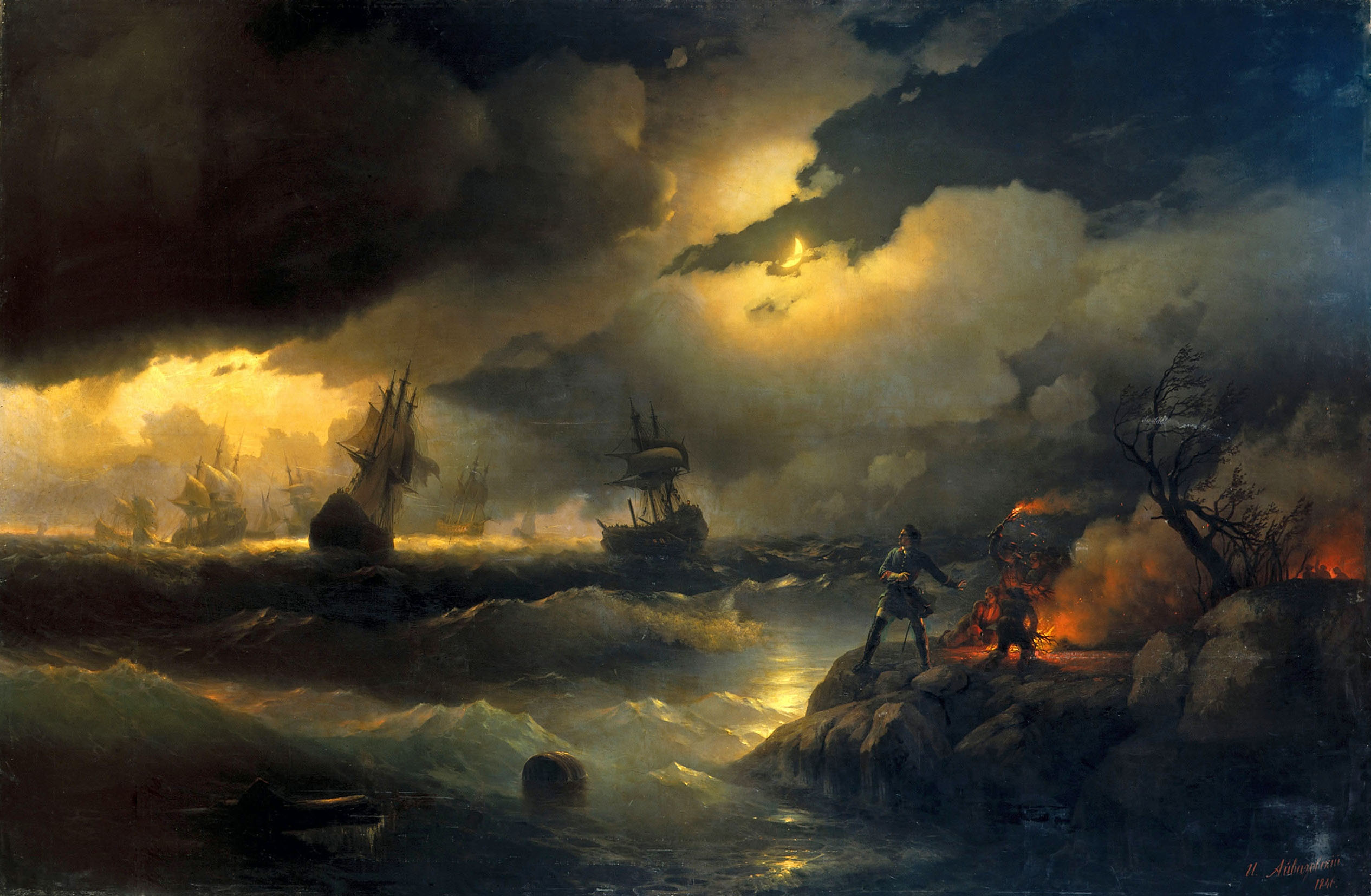 Петр I при Красной горке. 1846 Холст, масло. 223х335см. Государственный Русский музей, Санкт-Петербург